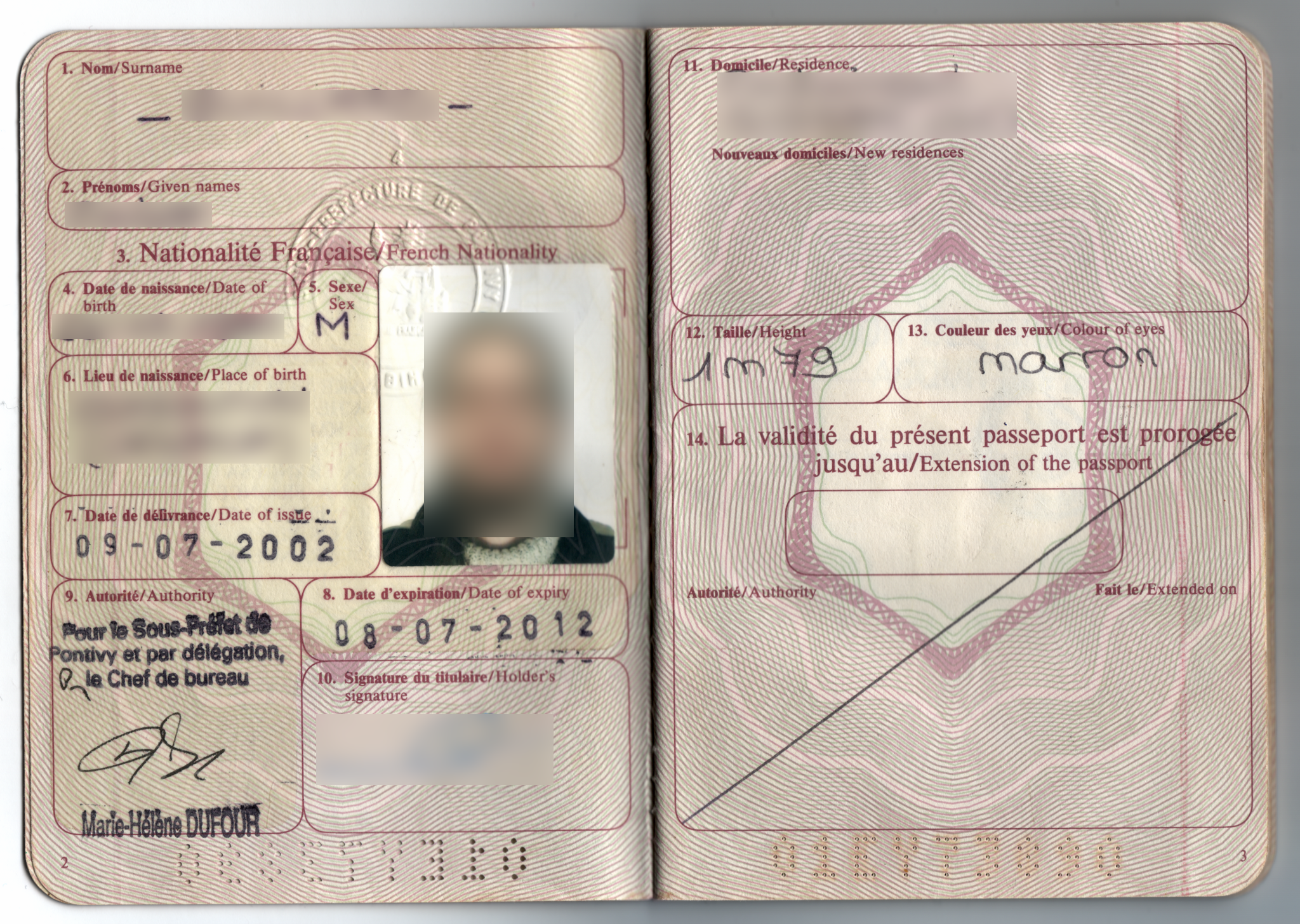 Passeport français délivré jusqu'en 2002, pages 2 & 3 (pages principales).